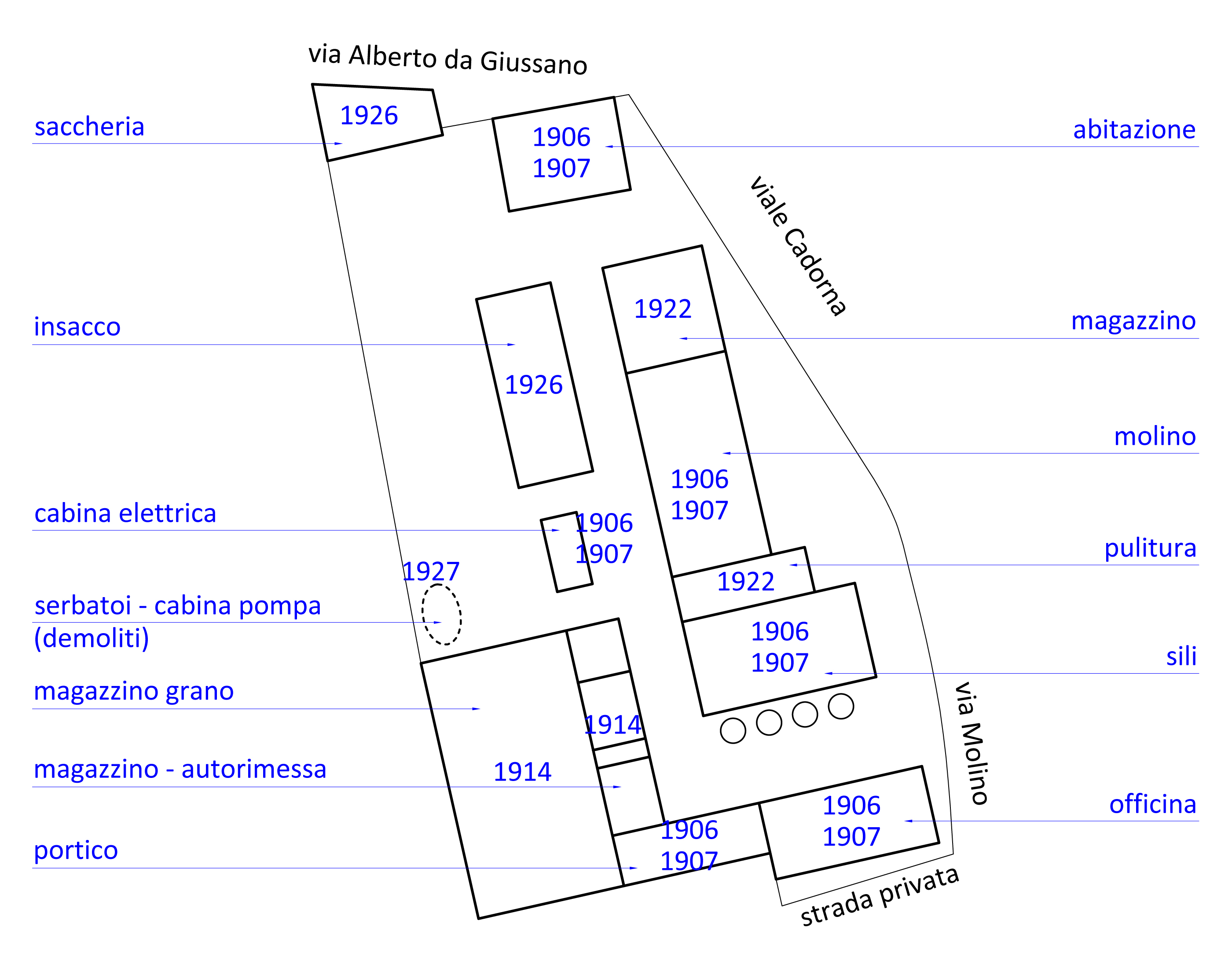 Planimetria dei Molini Marzoli Massari di Busto Arsizio con indicazione dell'anno di costruzione dei vari edifici che formano il complesso.